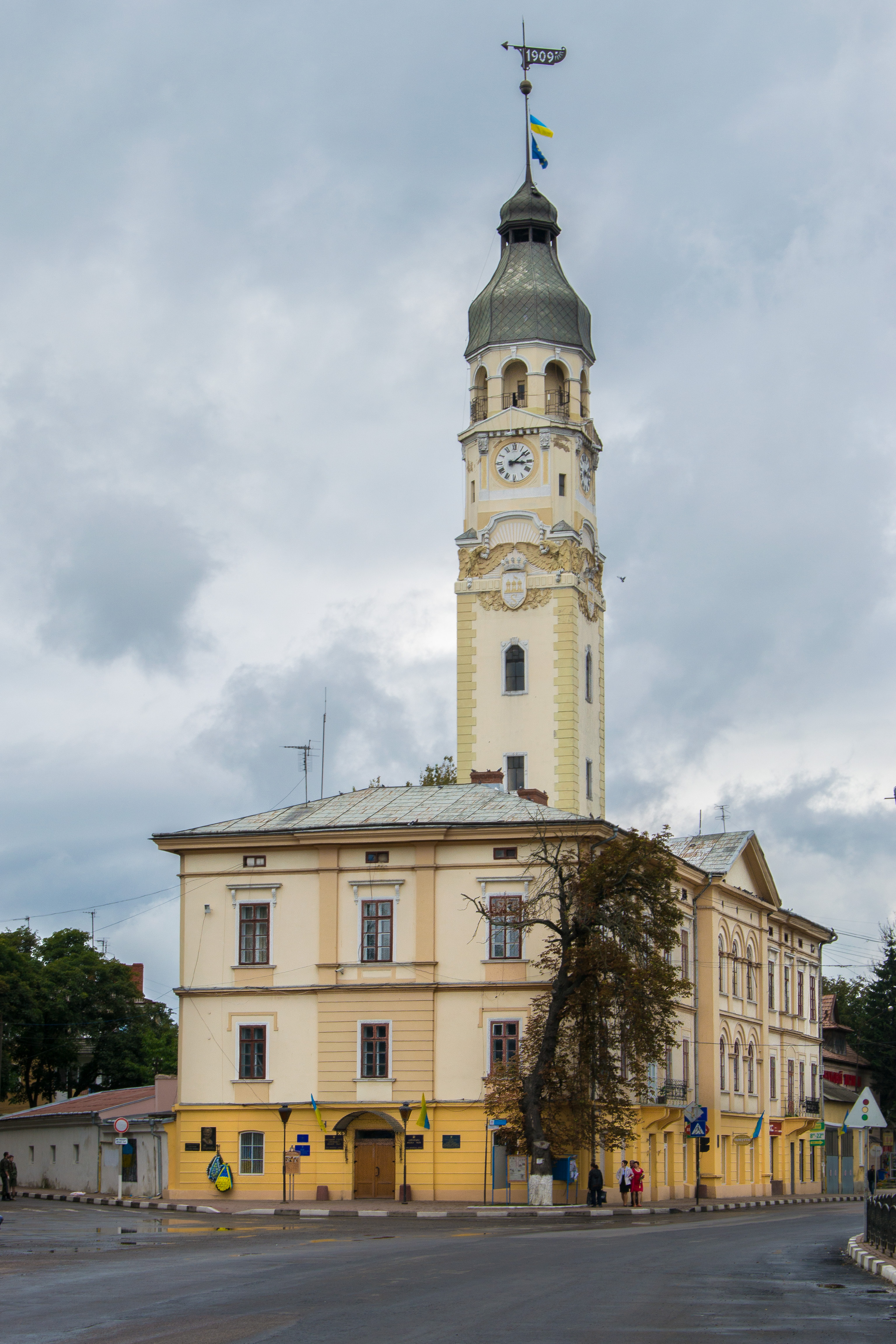 Ратуша (мур.), Снятин, вул. Шевченка, 70